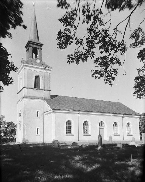 Kyrkan från sydväst. Snabbinv. Kategori: (01) ExteriörerKyrkan från sydväst. Snabbinv.